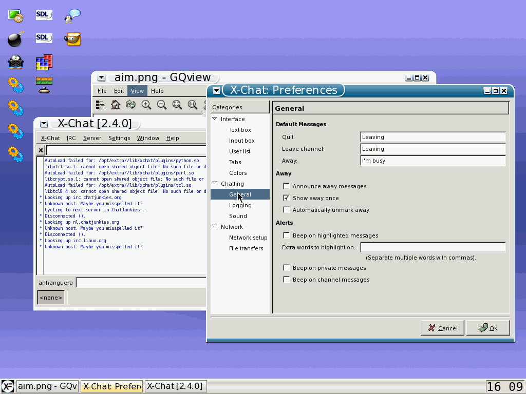 XFast Screenshot